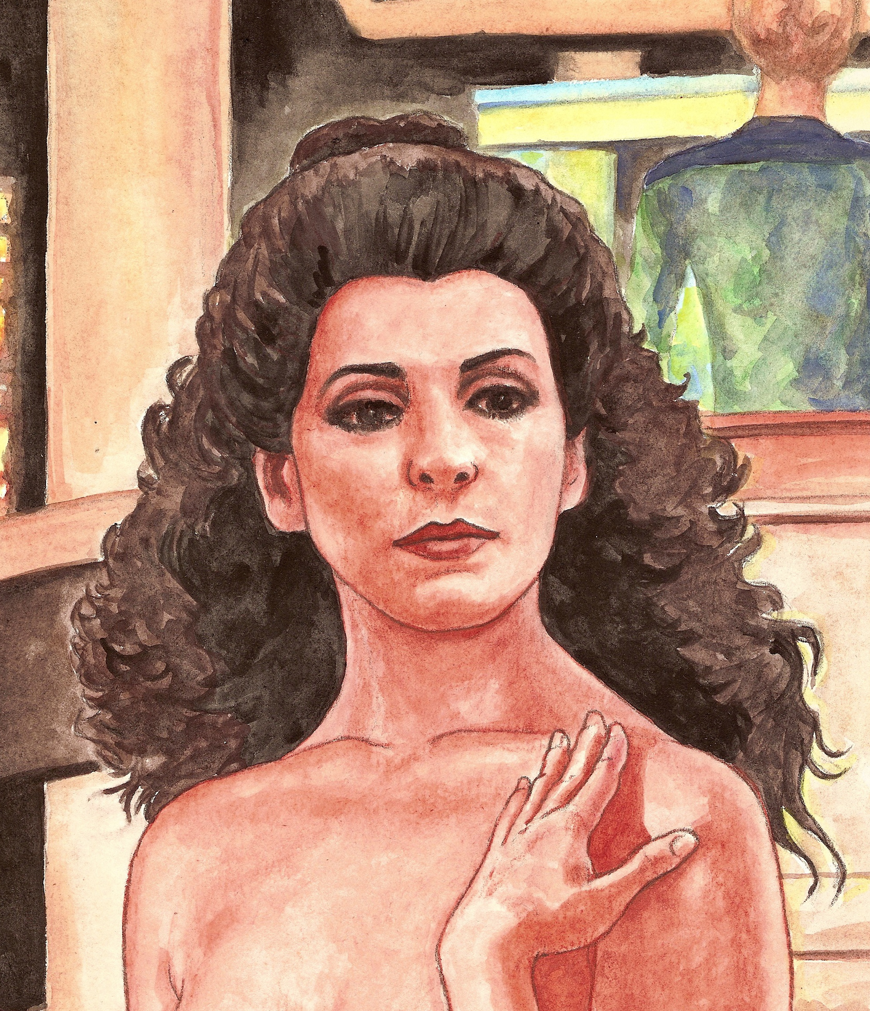 Akvarel